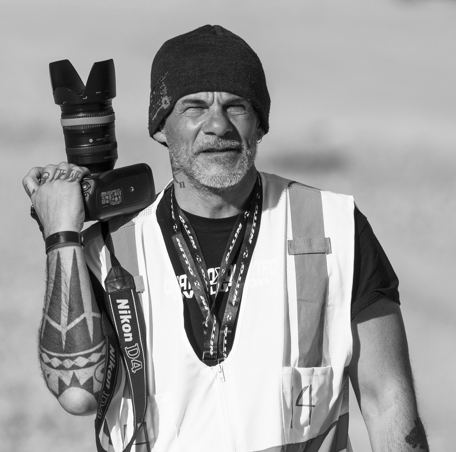 Paolo Baraldi